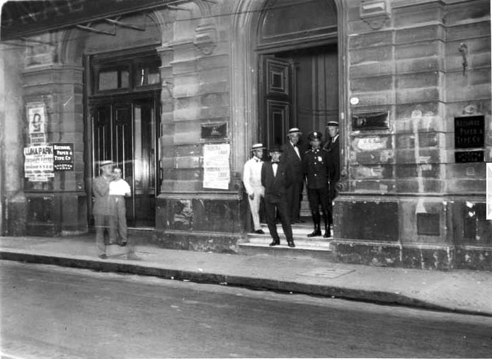 Diario Tribuna Libre, de filiación política ligada con la Unión Cívica Radical (UCR), en Piedras 150, Buenos Aires, Argentina.